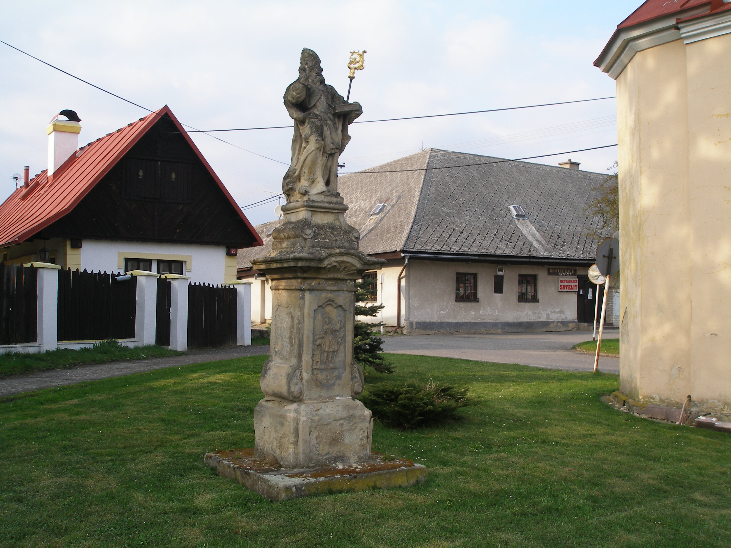 Socha svatého Vojtěcha v Židněvsi.